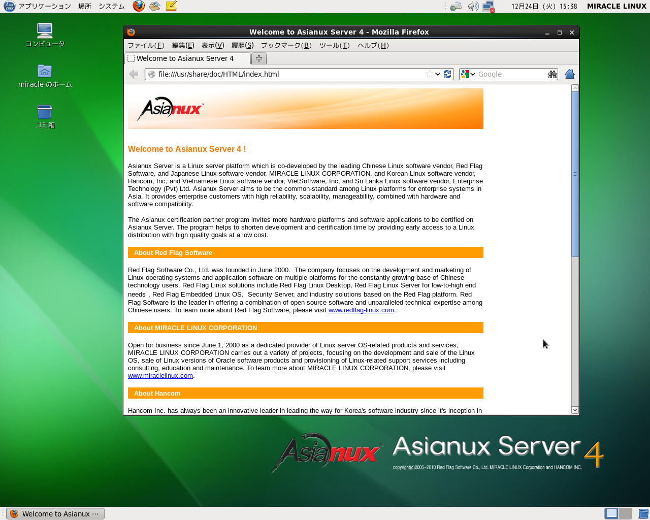 AXS4の画面ショット